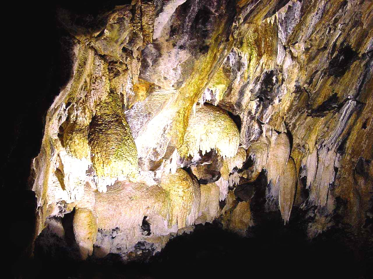 Algar do Carvão, Ilha Terceira, Açores - Portugal.